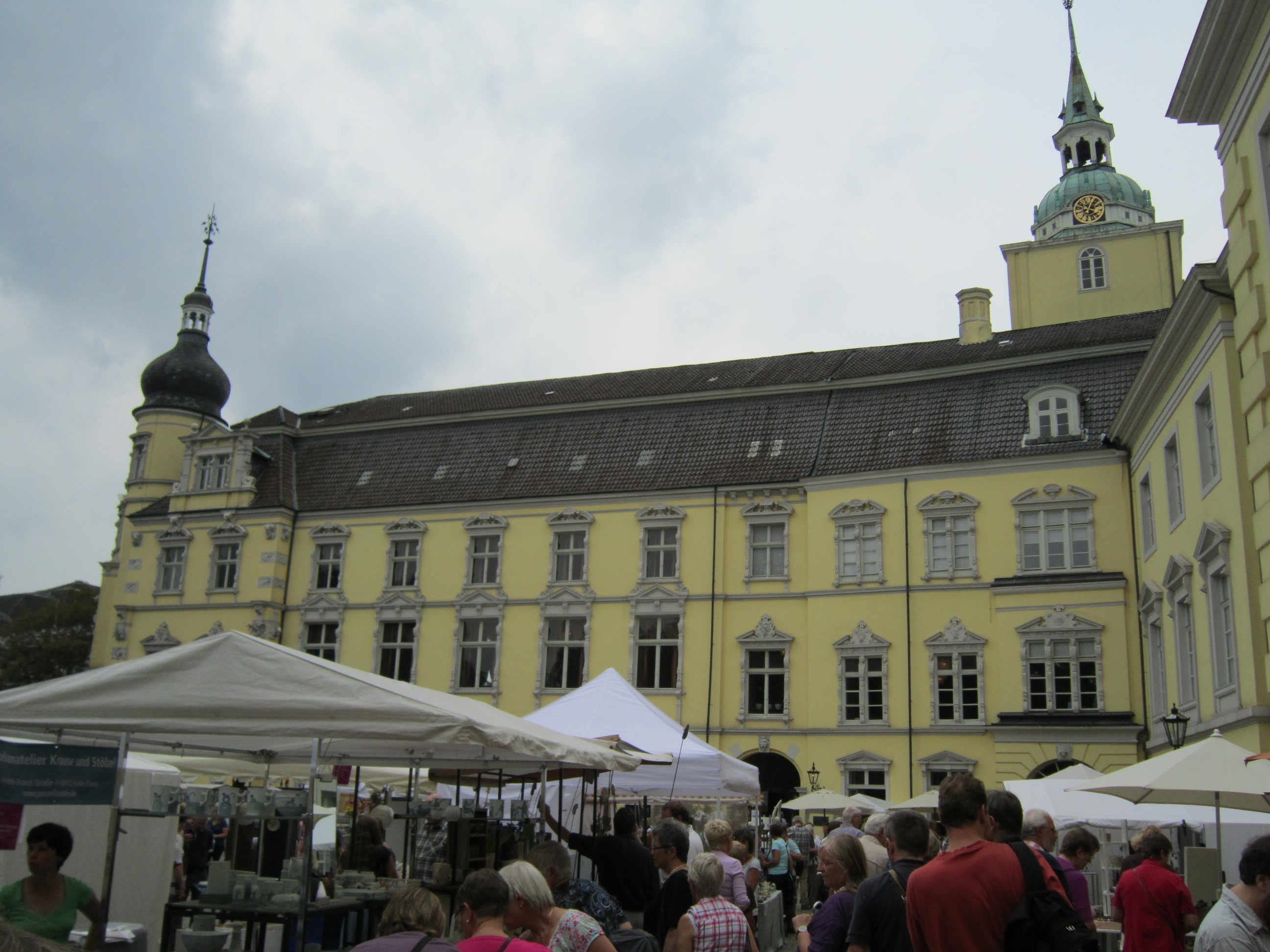 Hof des Residenzschlosses Oldenburg an den Internationalen Keramiktagen 2011